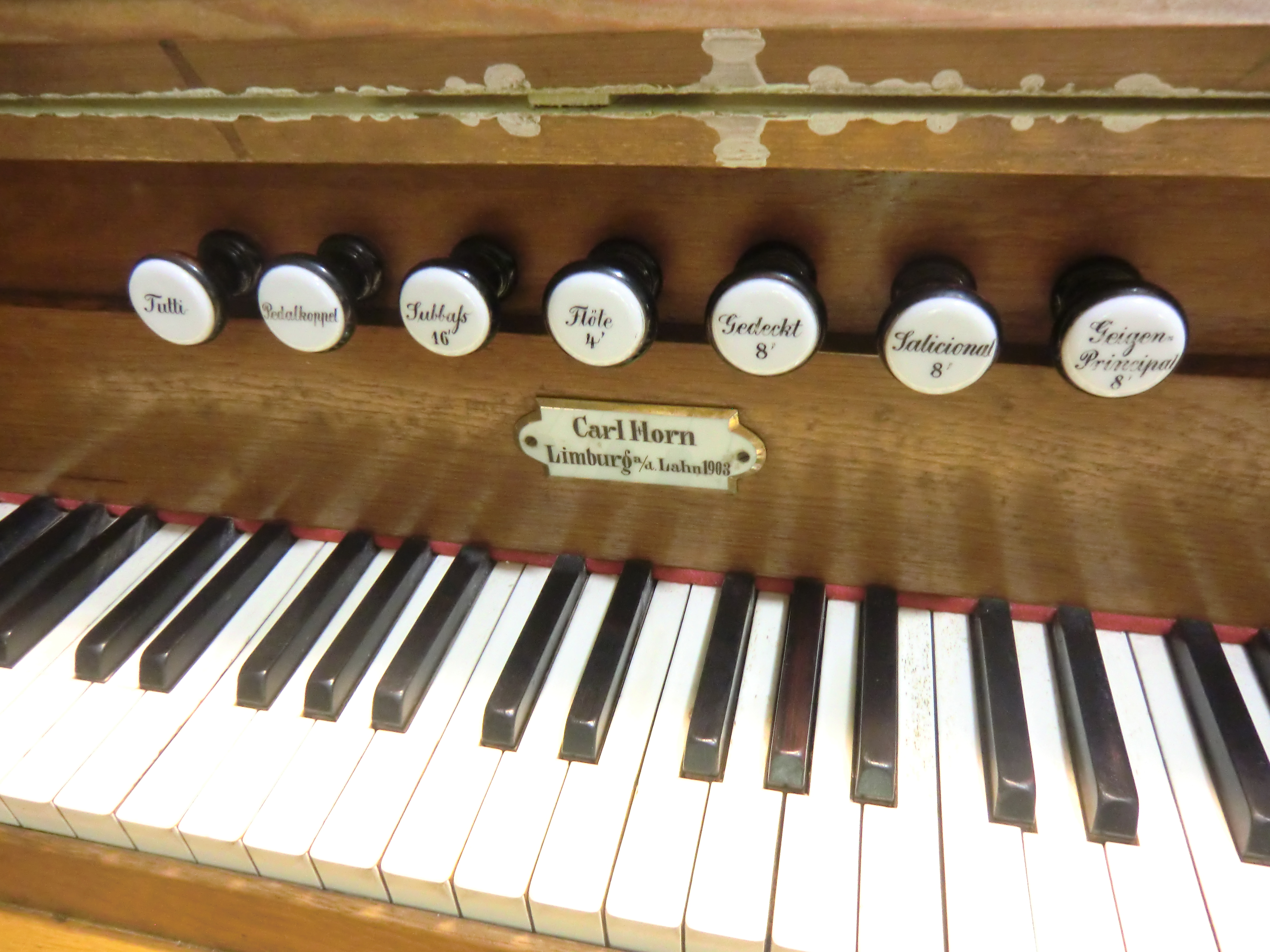 Horn-Orgel in Sauerthal (1903) - Manubrien (mechanisch)